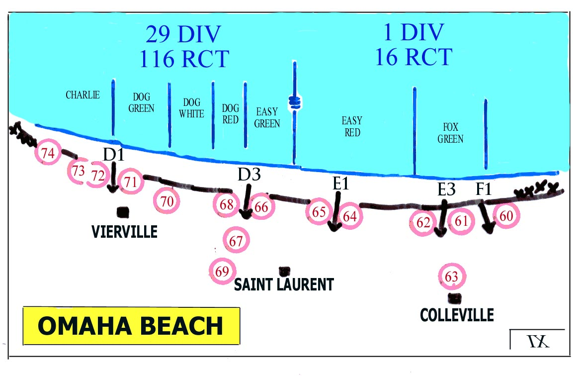 Carte schématique réalisée par l'auteur (Utilisateur:Fistos) Description : Carte schématique d'Omaha beach Auteur de l'image : Fistos Licence : domaine public